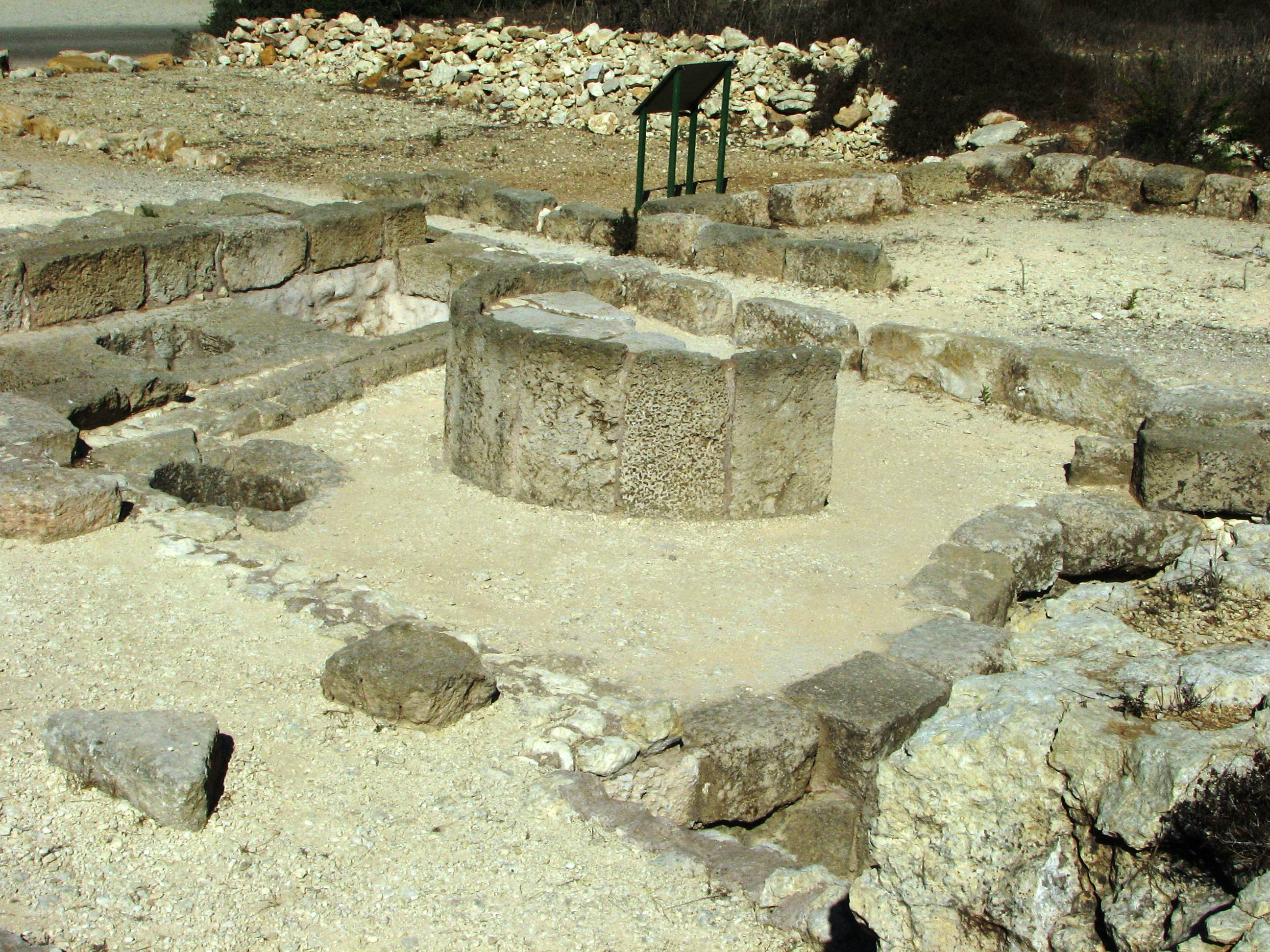 Hurbat Castra – Oil Presses. Byzantine Period 4th-7th Centuries. Located at Haifa בית בד מחורבת קסטרא, התקופה הביזנטית מאות 4-7 לספירה. החורבה נחפרה במבואותיה הדרומיים של חיפה, על התוואי המתוכנן של מנהרת הכרמל. באתר התגלתה עיר רומית ביזנטית שכלכלתה התבססה על ייצור יין ושמן זית בכמויות תעשייתיות. בשנת 1997 הועברו שניים בתי בד לאתר דרך הדורות שבפארק הכרמל. מתקן ריסוק הזיתים